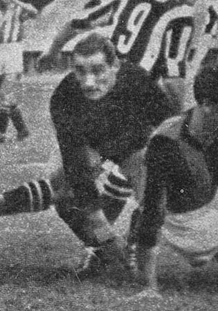 Torino, stadio Municipale Benito Mussolini, 28 giugno 1942. Il portiere rossonero Giovanni Rossetti in azione nel corso della sfida tra Juventus e AC Milano (4-1) valevole per la finale di ritorno della Coppa Italia 1941-42.